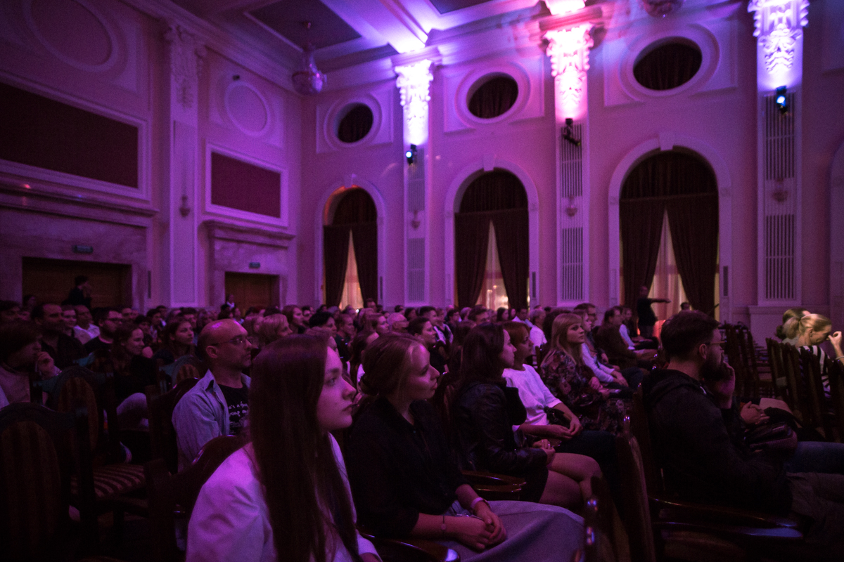 Bytom Film Festival // Opera Śląska (2018)